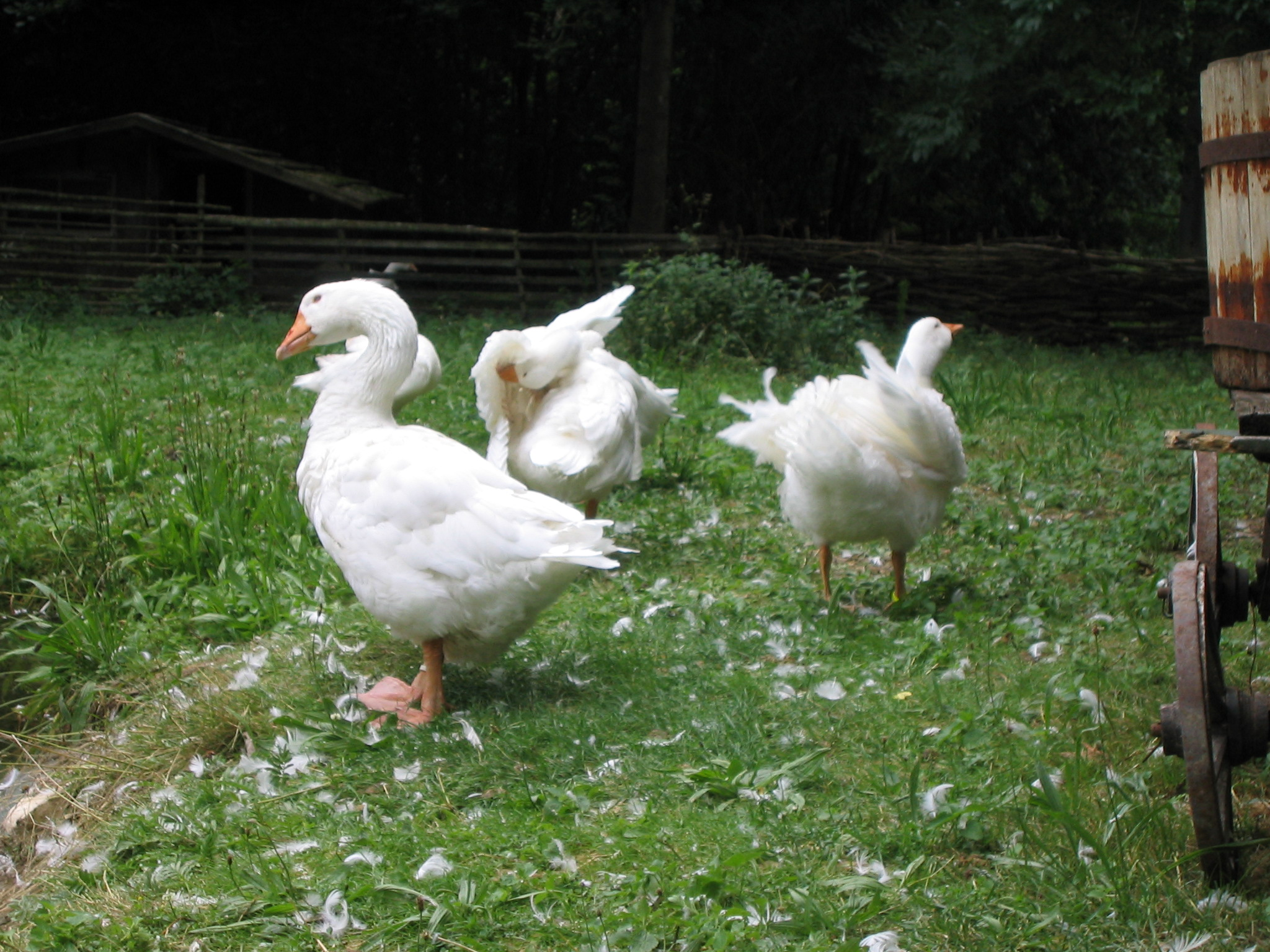 Pommerngänse im Freilichtmuseum Neuhausen ob Eck